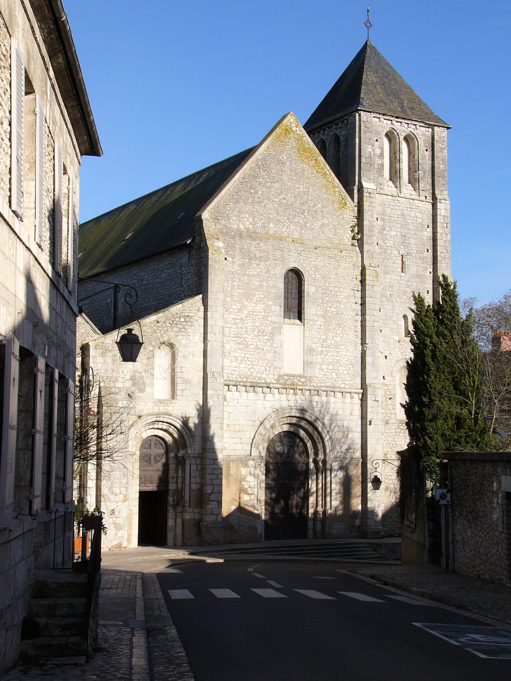 Beaugency (Loiret, France) : façade de l'abbatiale Notre-Dame